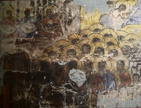 Фреска от църквата "Света Петка" в село Бериславци, Егейска Македония, Гърция.